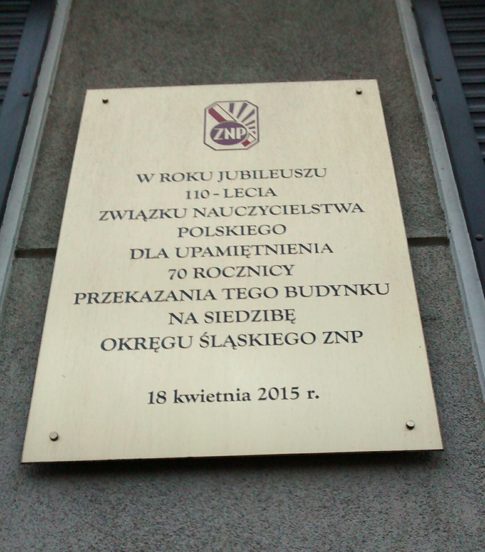 Tablica pamiątkowa ZNP - fasada kamienicy przy ul. Starowiejskiej 11 w Katowicach